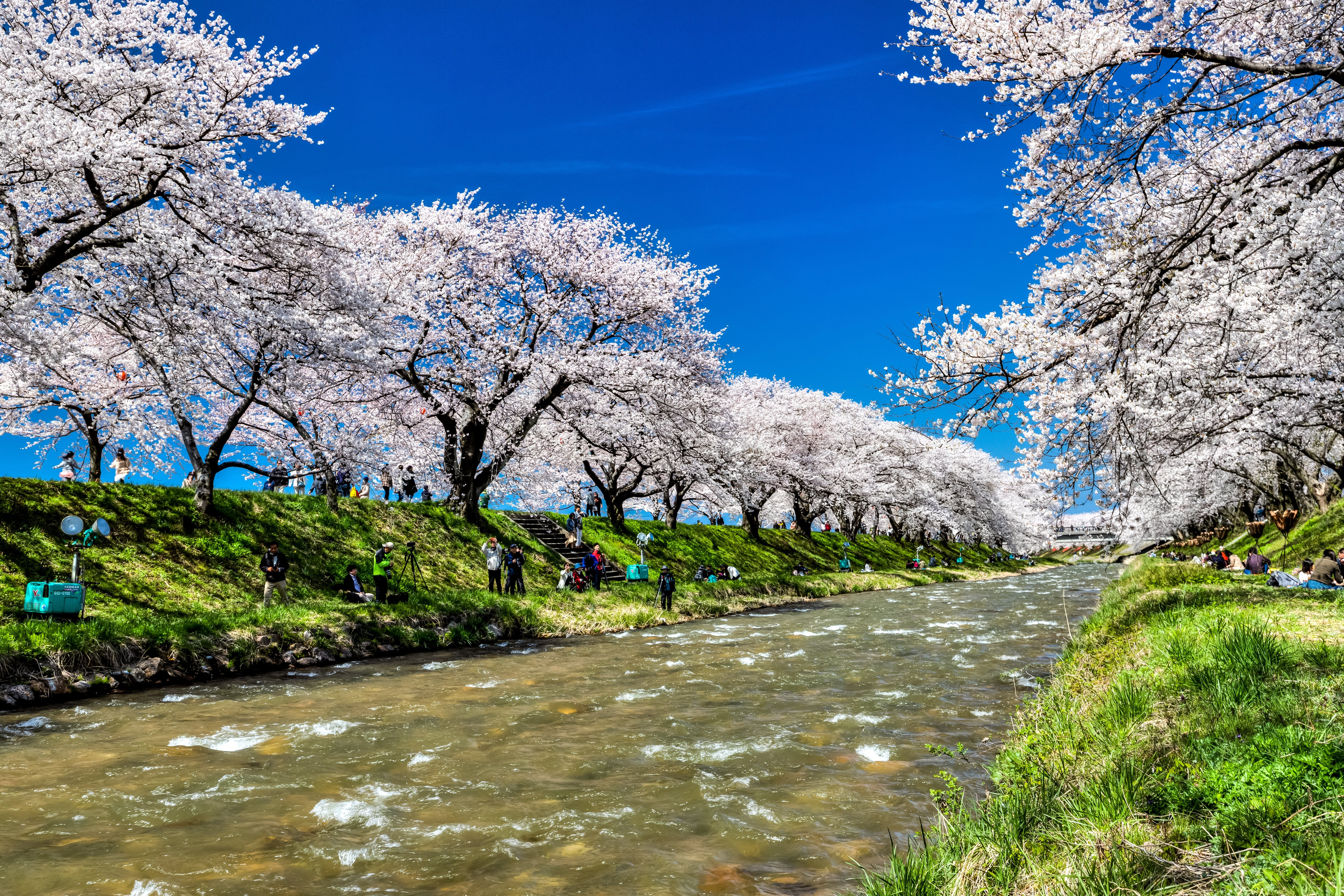 富山県下新川郡朝日町、舟川べり、桜